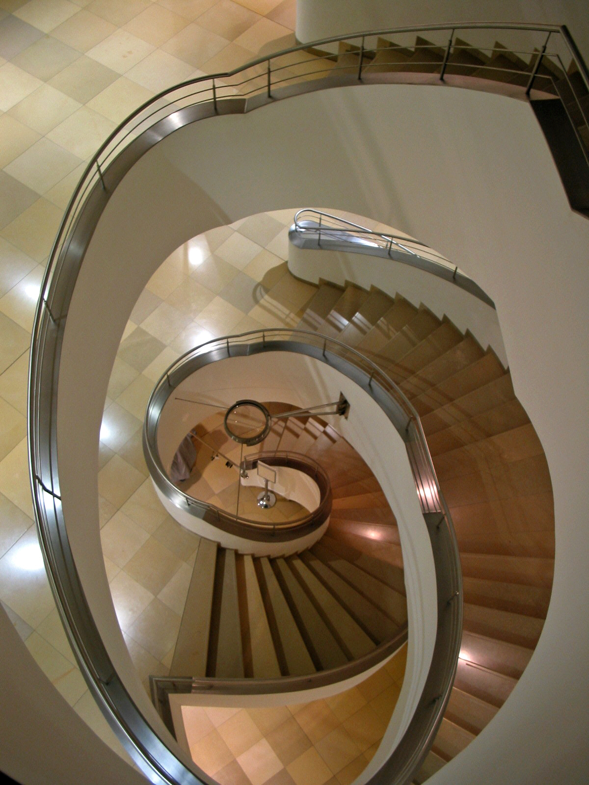 Gewendelte Treppe im Goethe-Nationalmuseum in Weimar.